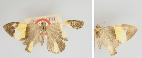 Hagnagora ephestris